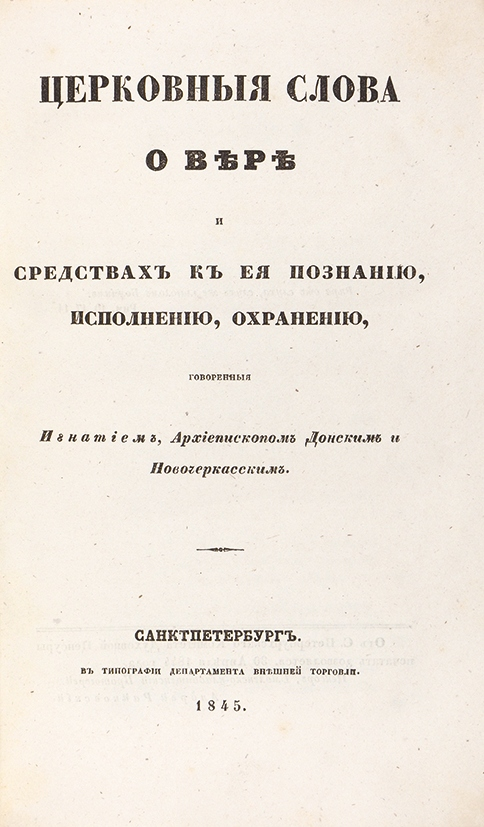 Церковные слова о вере и средствах к ее познанию, исполнению, охранению, говоренные Игнатием, архиепископом Донским и Новочеркасским. СПб.: В Тип. Департамента внешней торговли, 1845. VI, 368, [2] с.